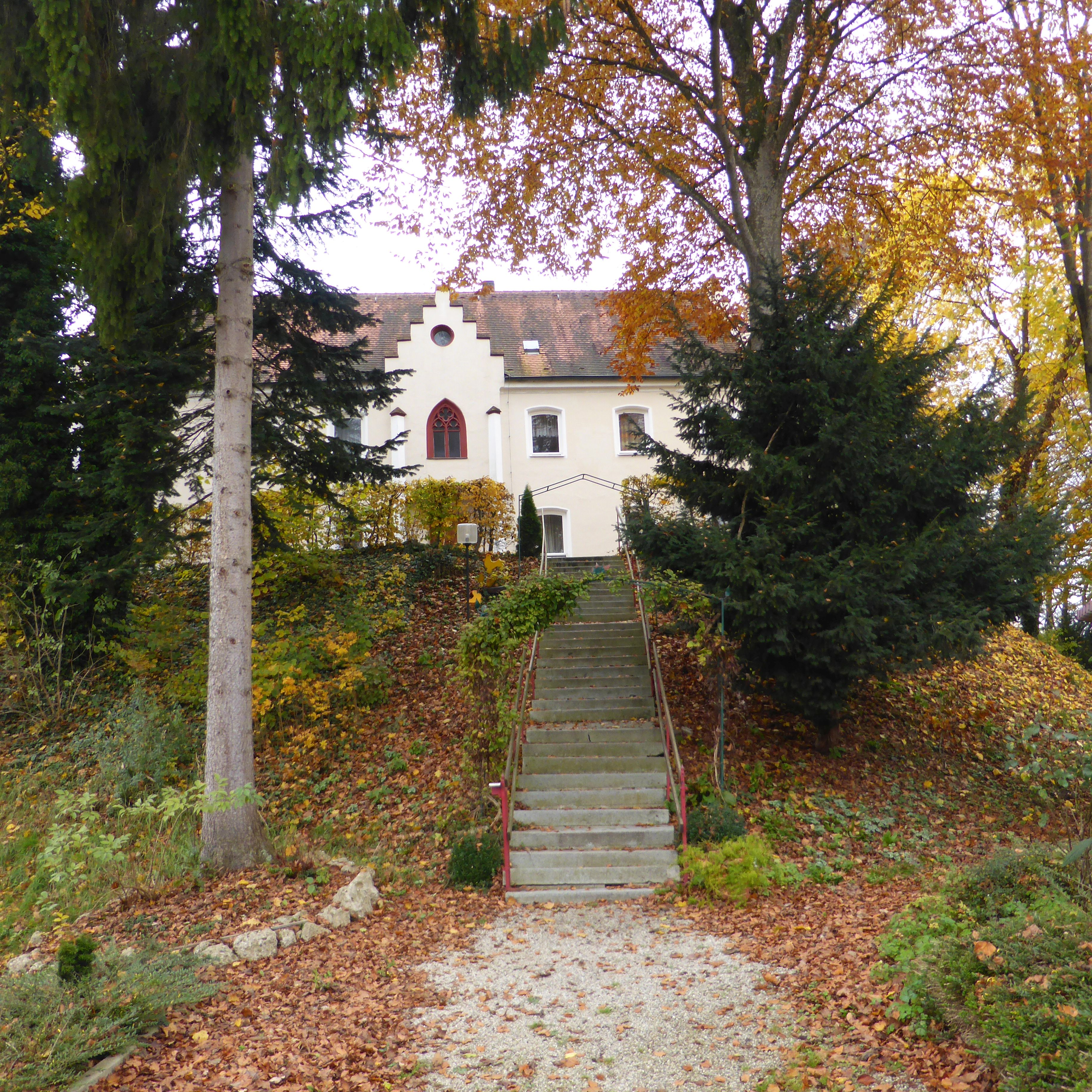 Kloster der Armen Schulschwestern